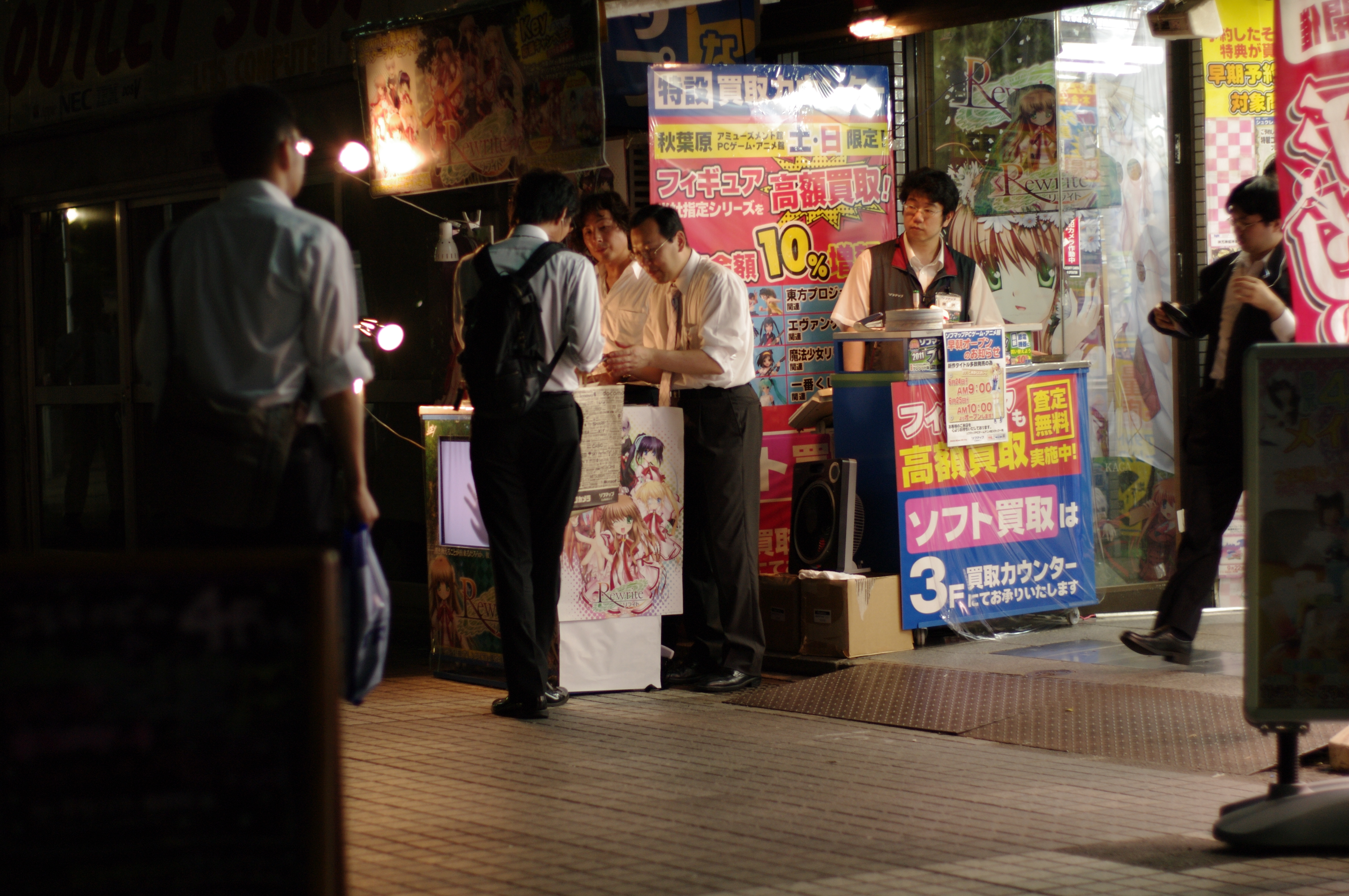 コスプレお姉さんでなくなるいつも通り